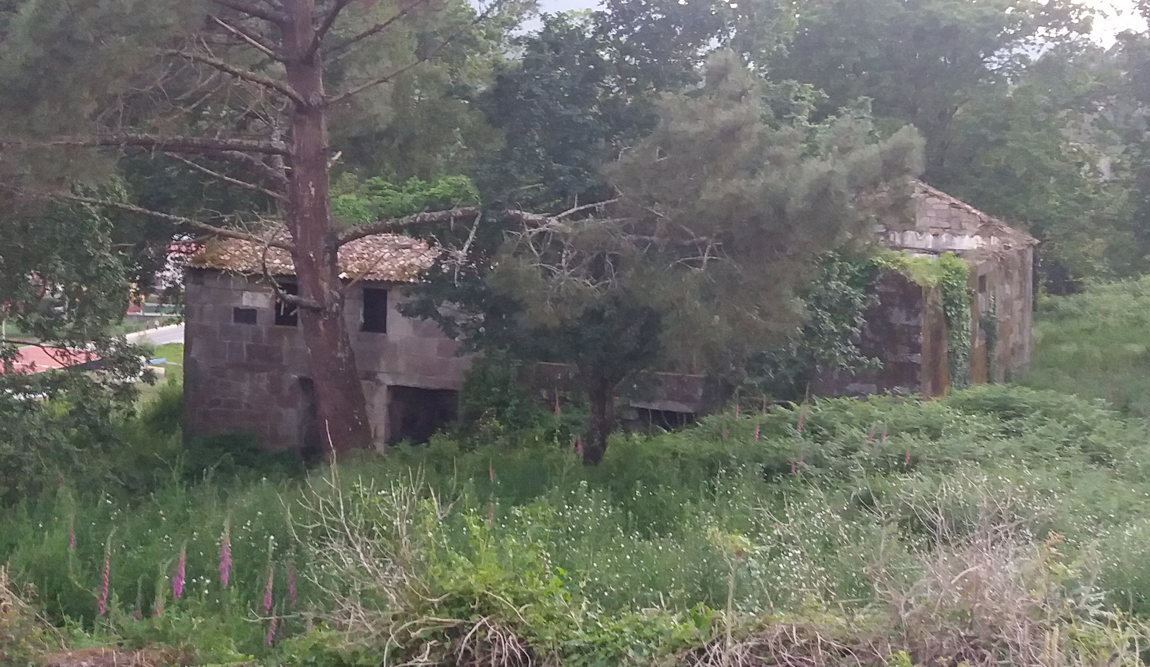 Vista xeral das ruinas do Pazo de Fontán.